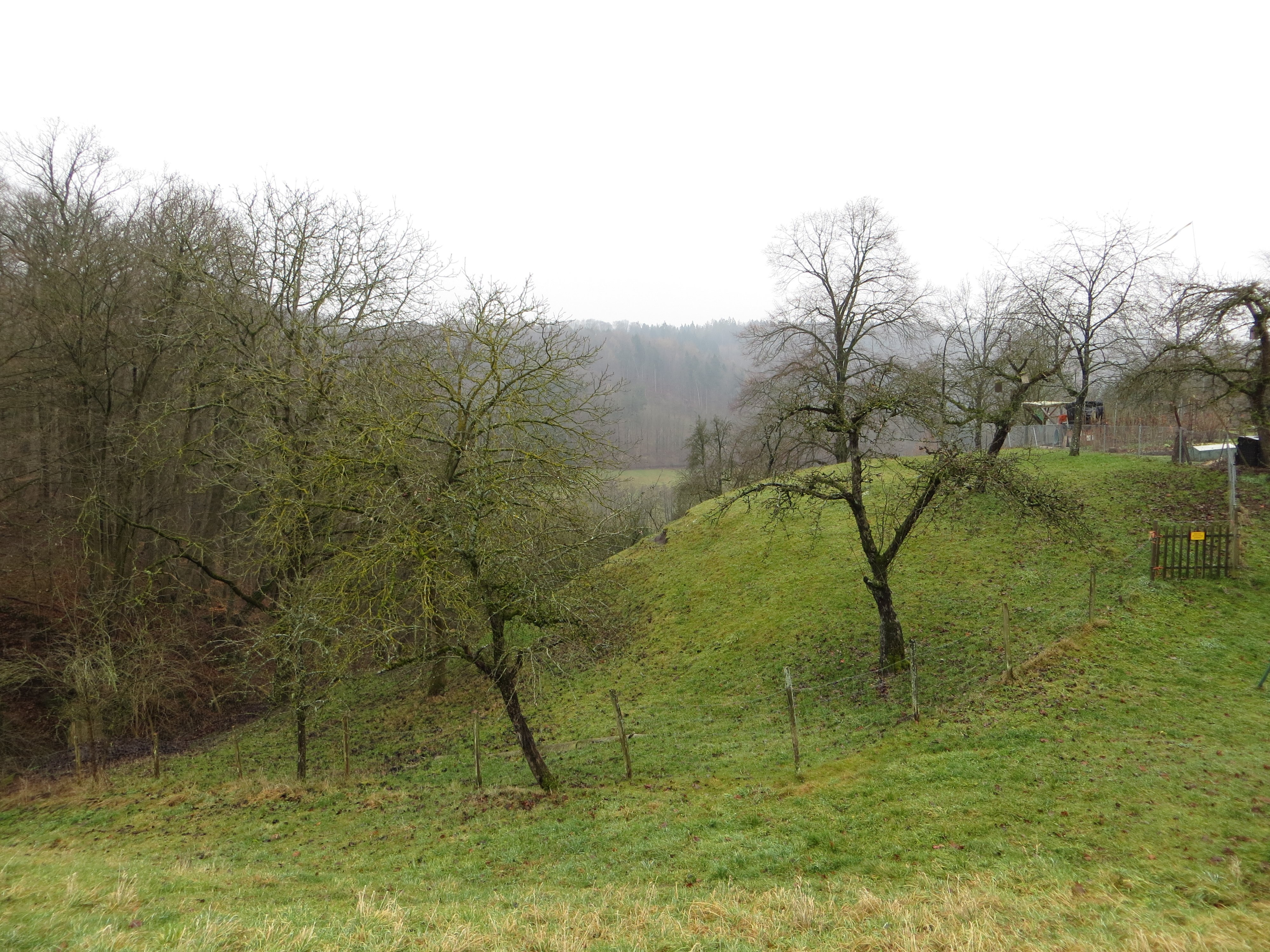 Blick auf den Burghügel der ehemaligen Burg Hohenriet in Untergruppenbach-Vorhof